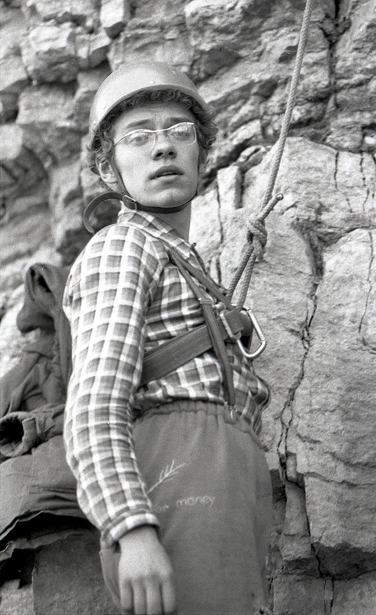 Kalle Hansen.